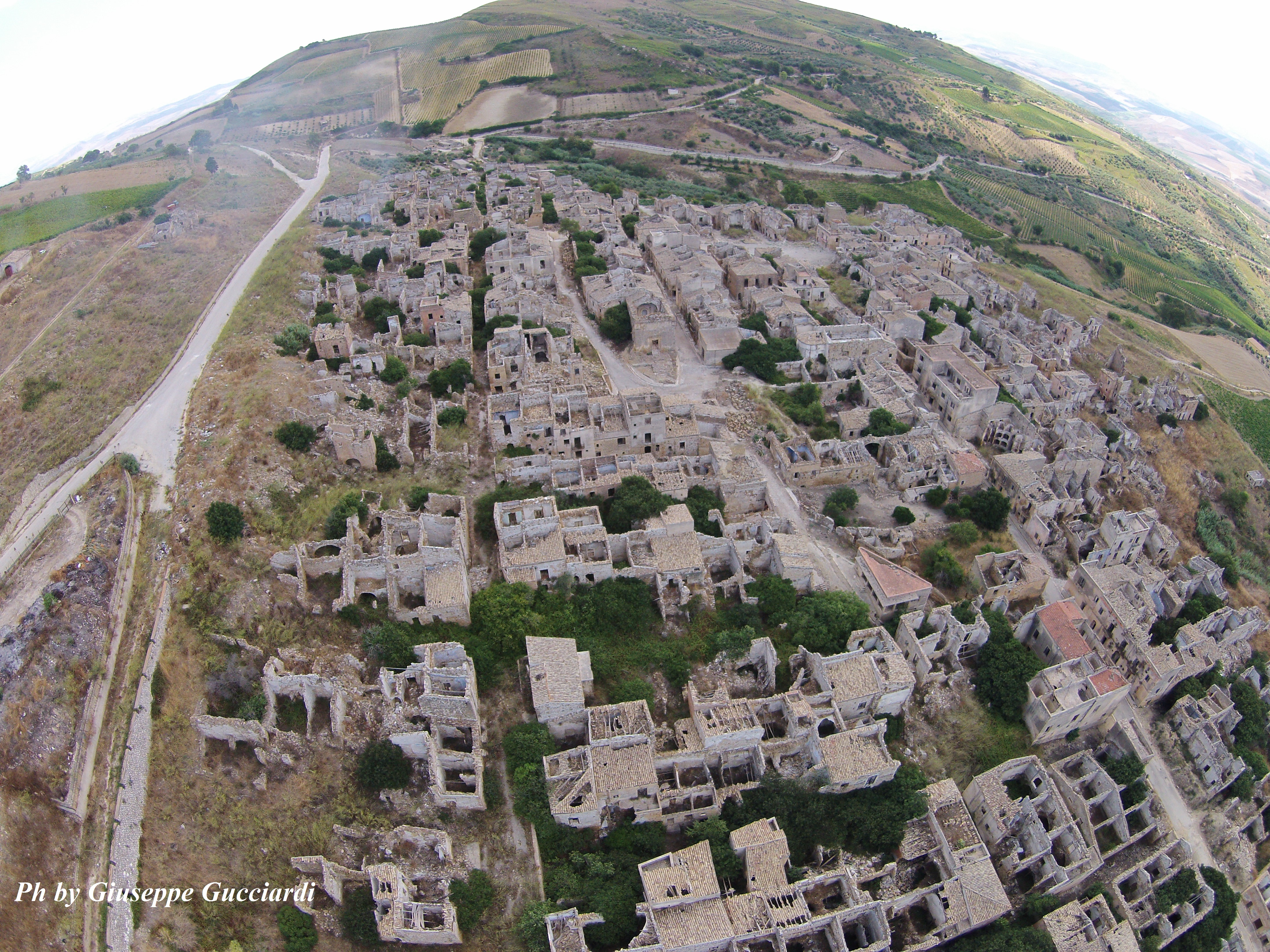 Vista da drone